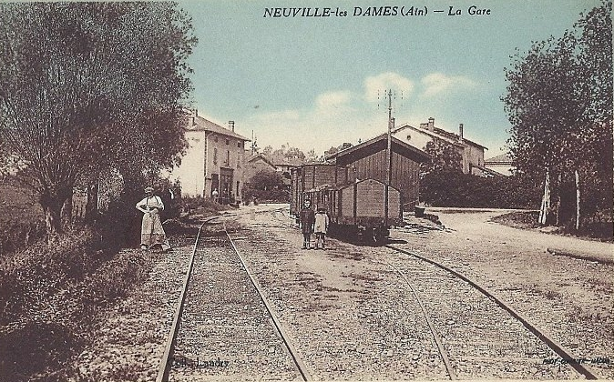 Gare de Neuville-les-Dames pour les tramways de l'Ain.